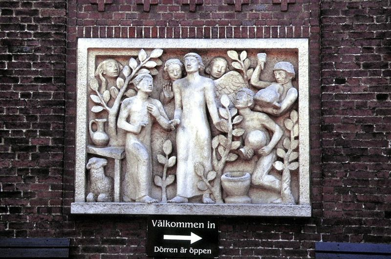 Gustafskirken i Danmark. Relief af Henrik Starcke